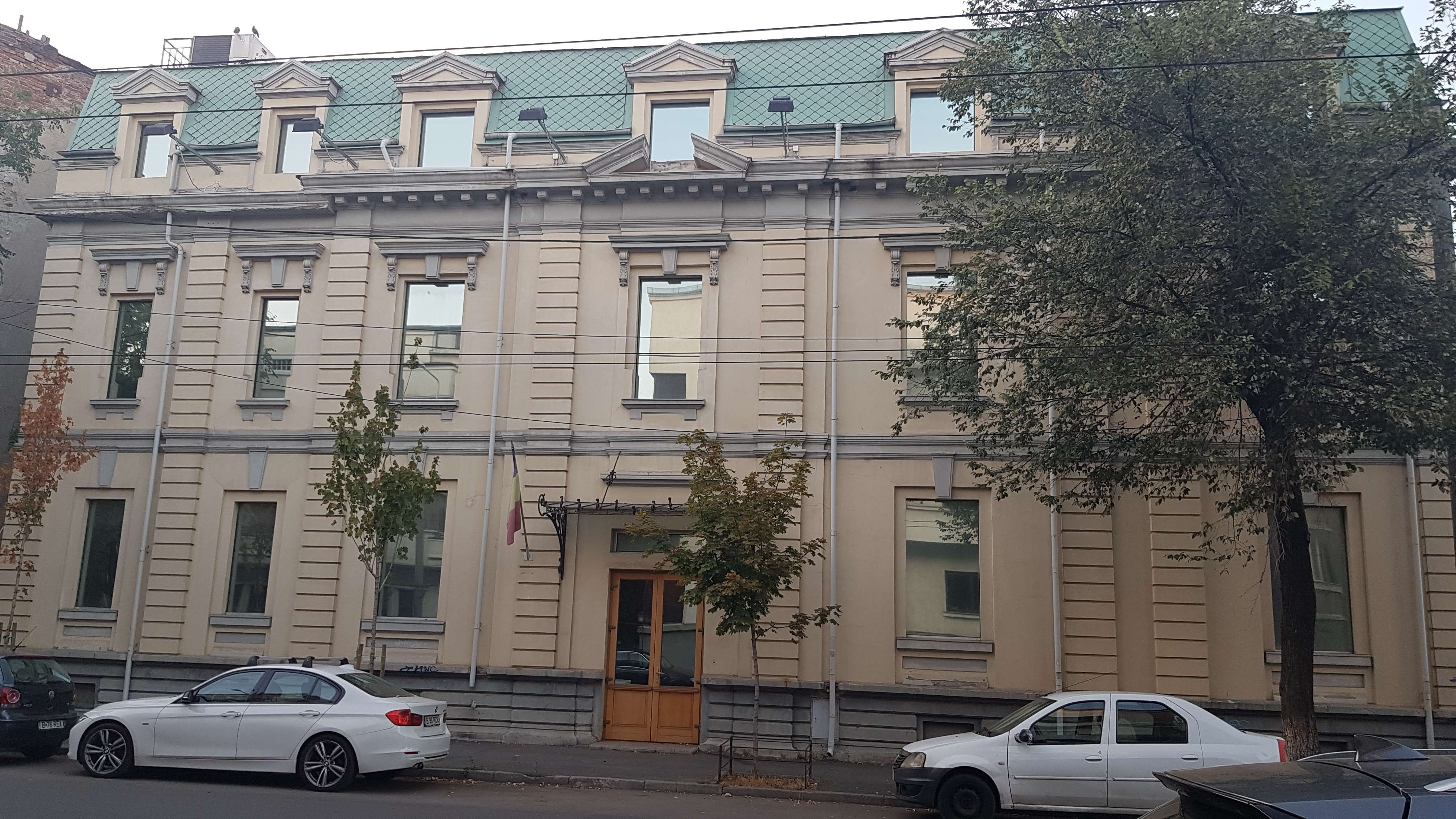 Casa G-ral Jitianu I.